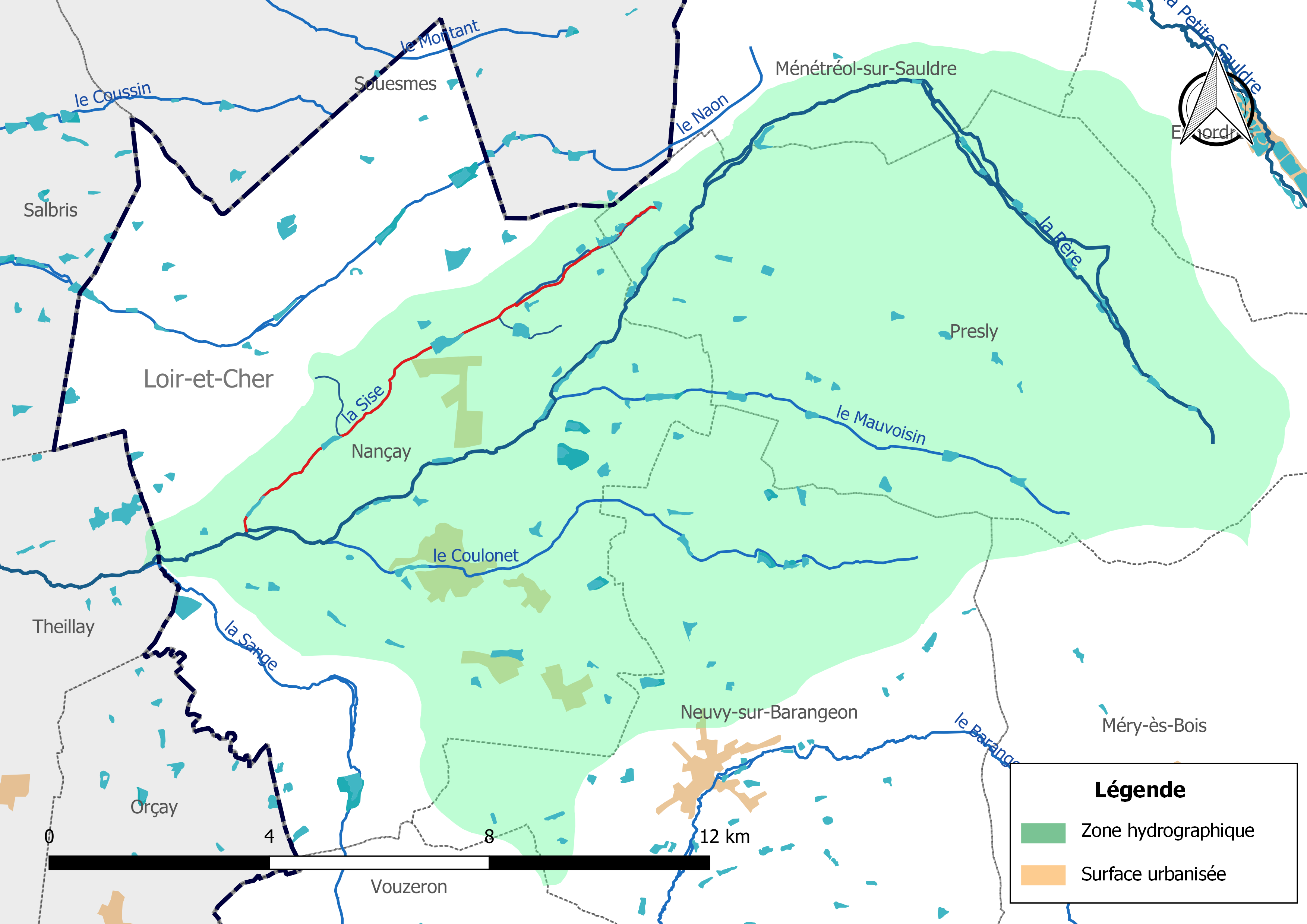 Carte du cours d'eau « la Sise » (France) et de la zone hydrographique dans laquelle il s'insère.